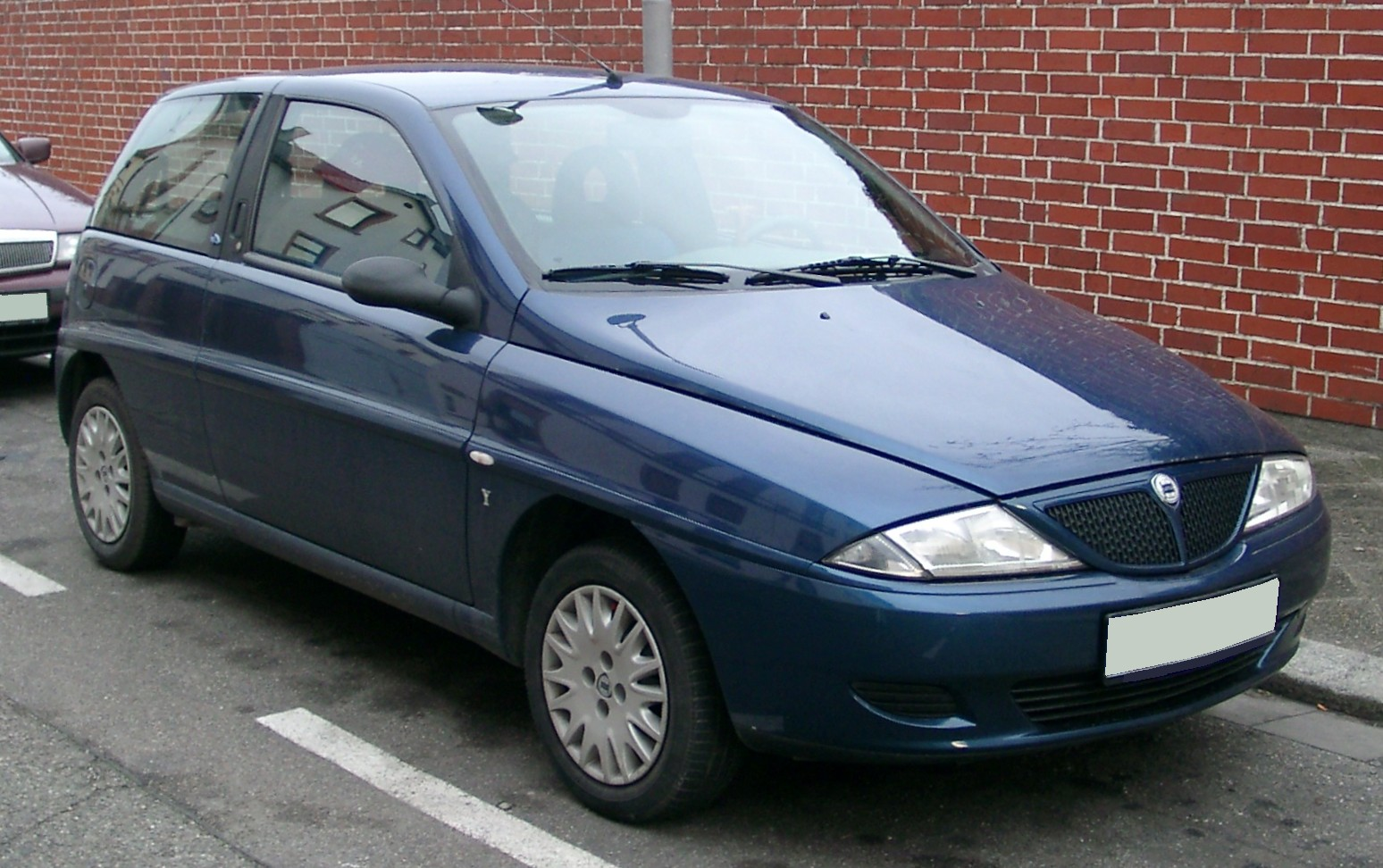 Lancia Y